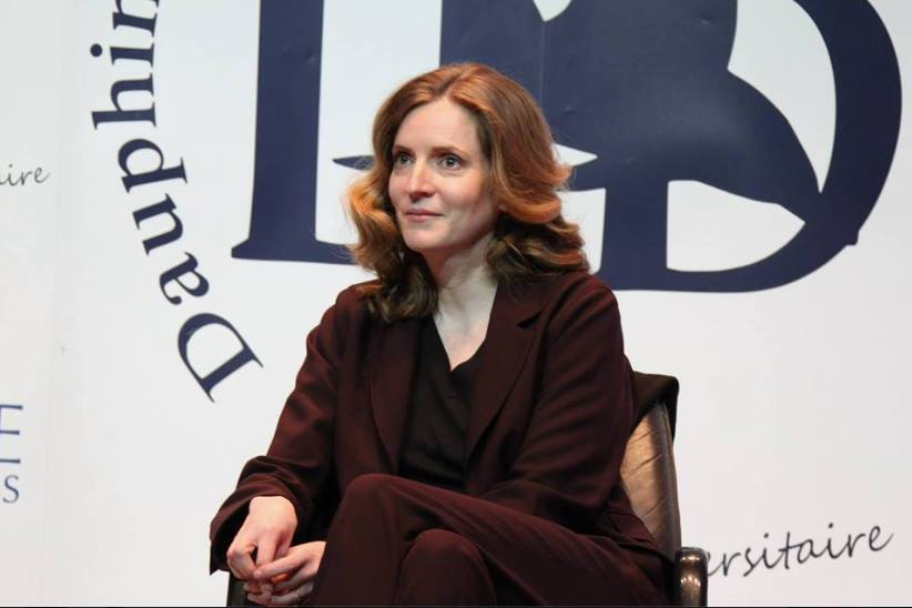 Débat avec Dauphine Discussion Débat